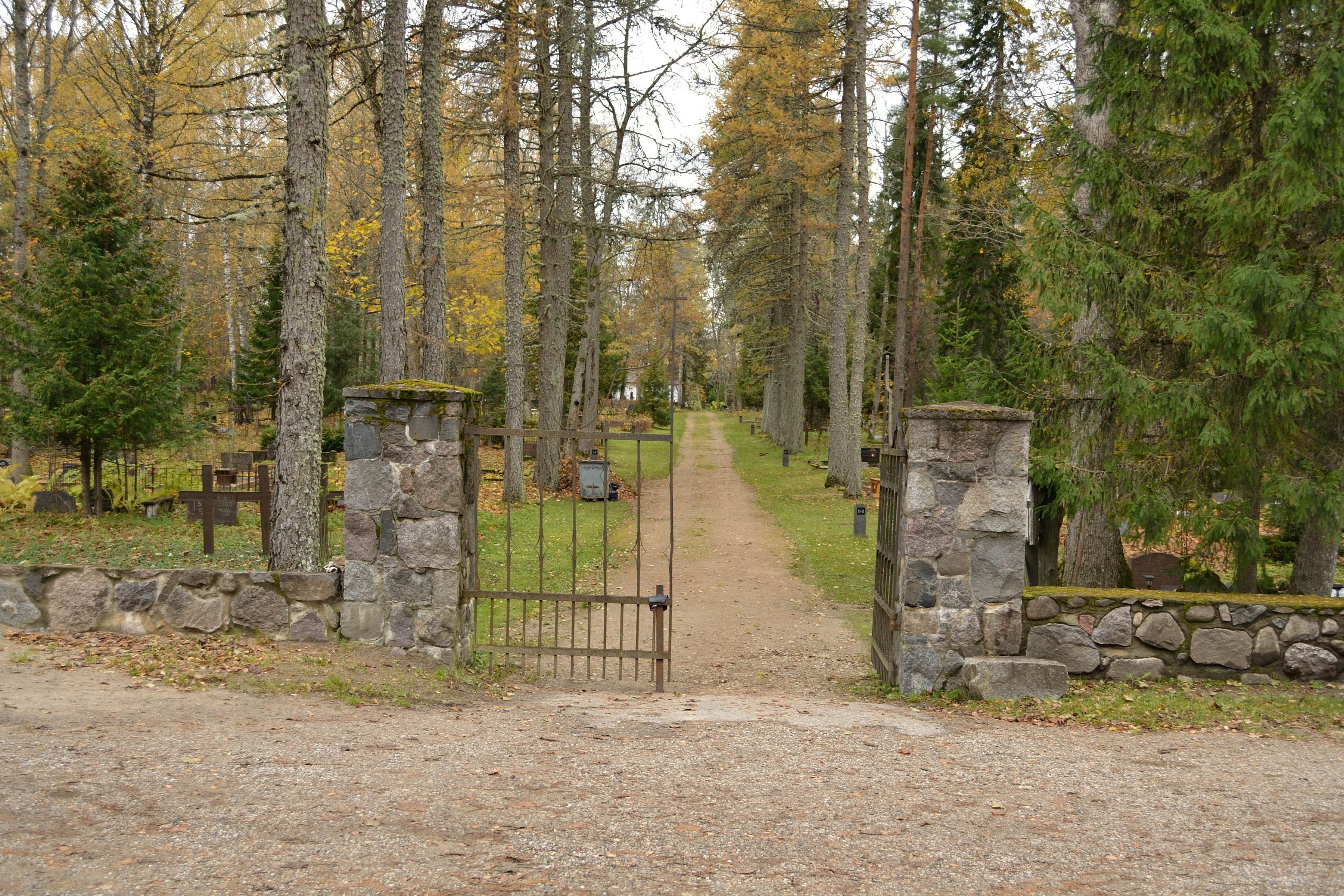 Hageri kalmistu